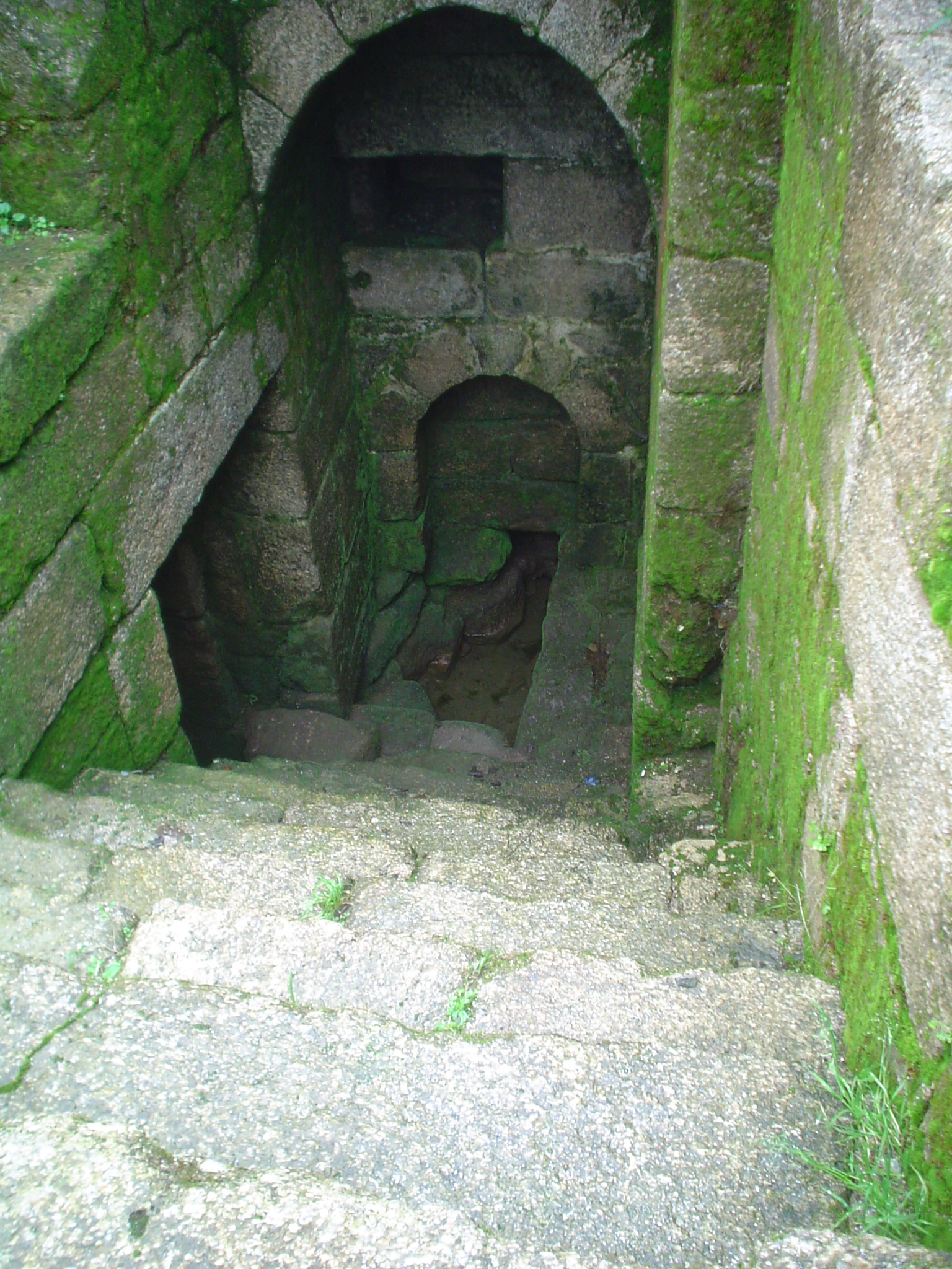 Castelo da Rocha forte. Conxo - Santiago. Escaleiras a subterráneo